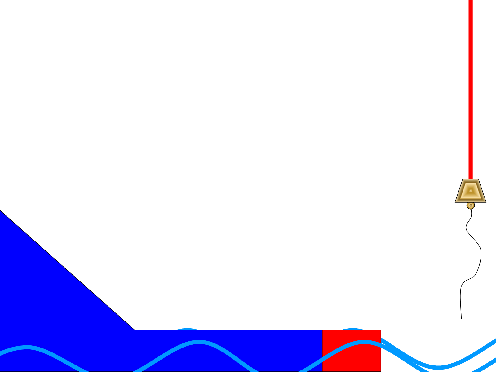 Tekening van traject Te land, ter zee en in de lucht